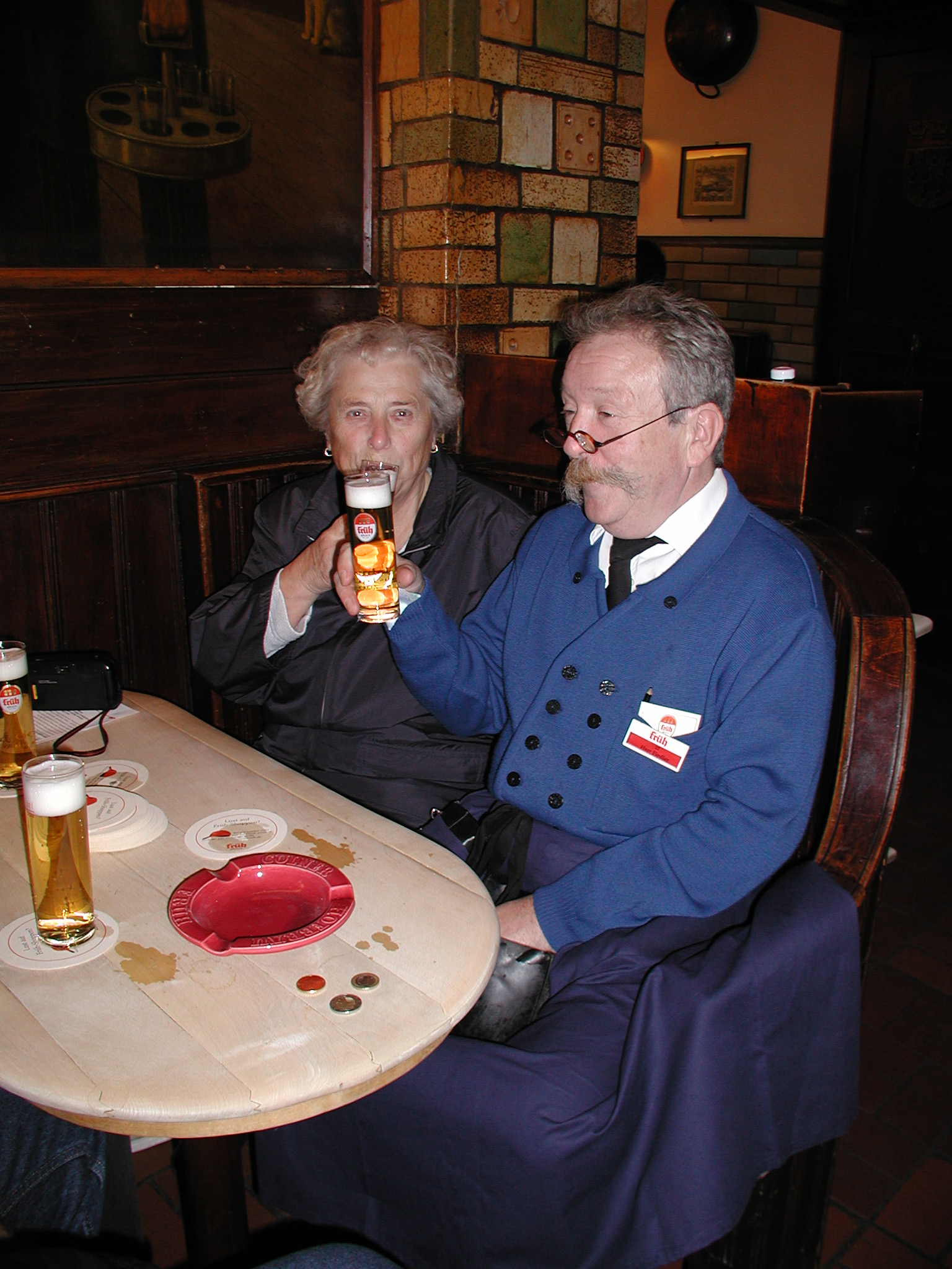 Kölner Traditionen - Köbes